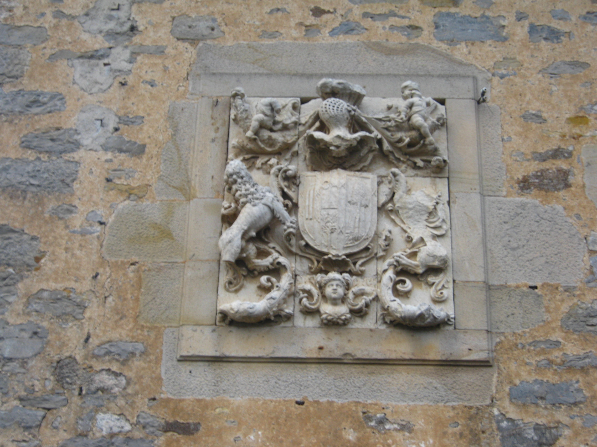 Escudo heráldico en Foronda (Álava, España)